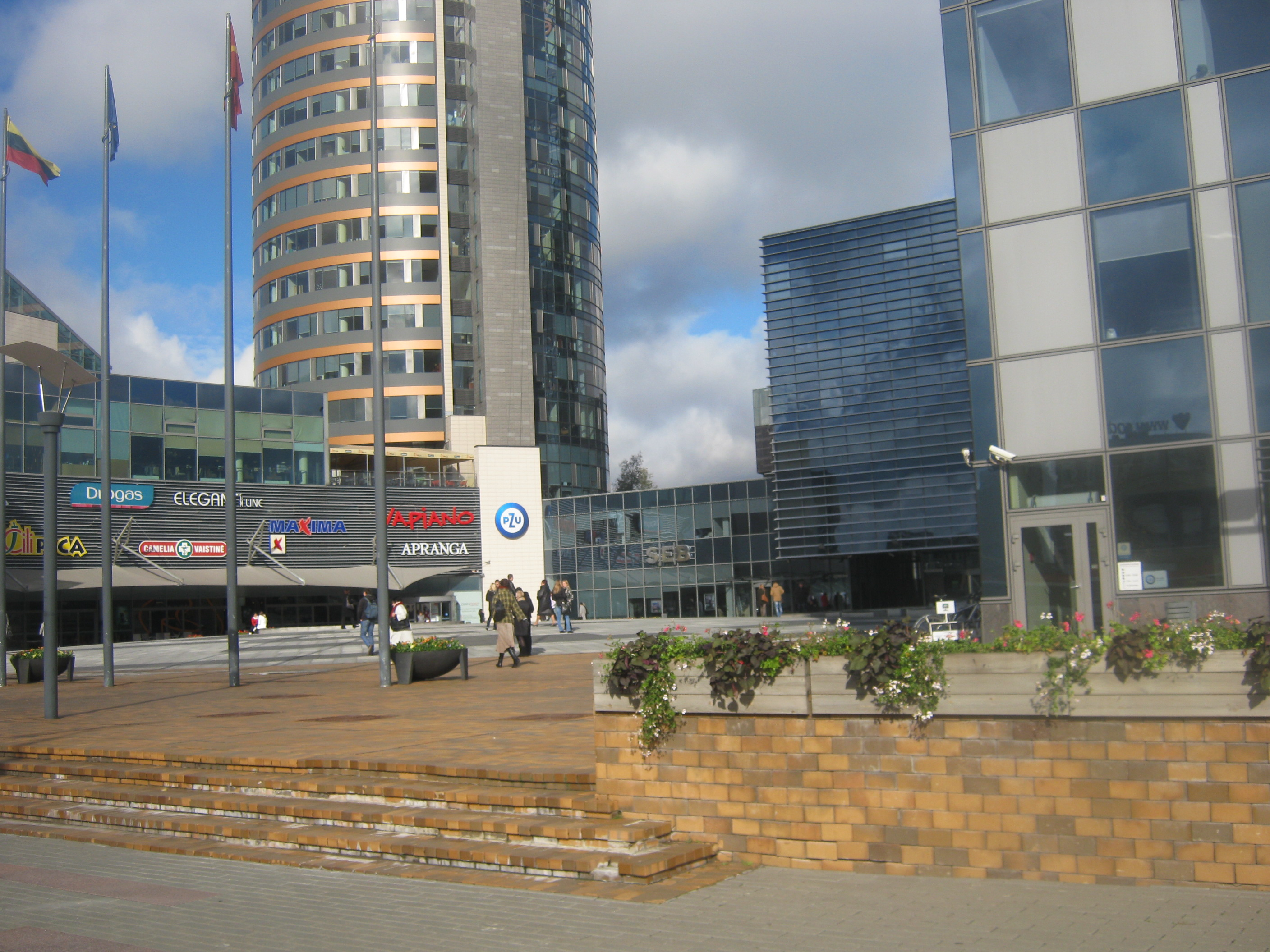 Vilnius